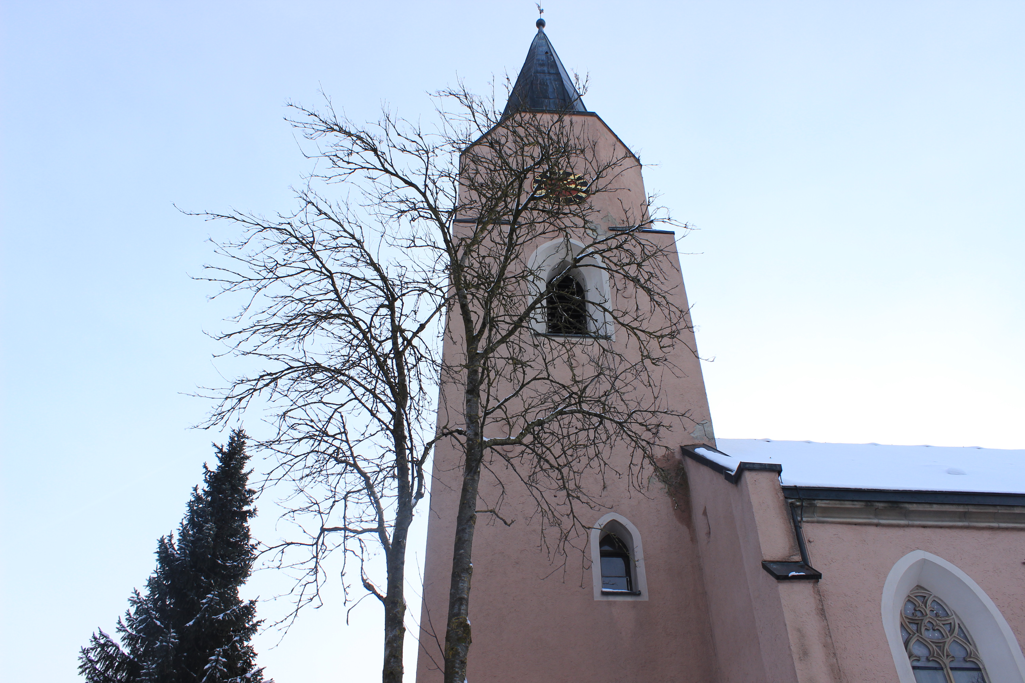 Das ist die evangelische Johannes-Kirche des Teilorts Urspring. Sie wurde 1858 erbaut.